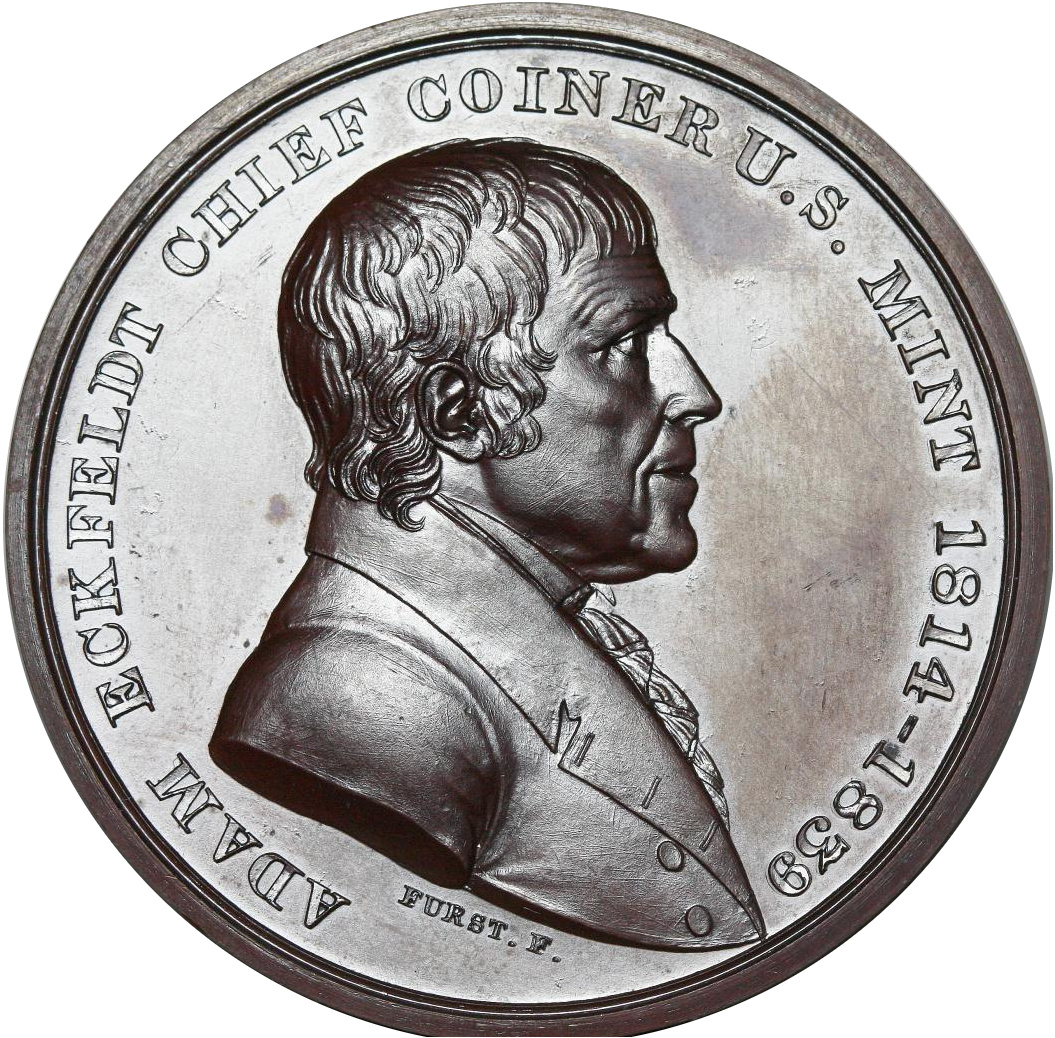 Retirement medal for Adam Eckfeldt, 1839